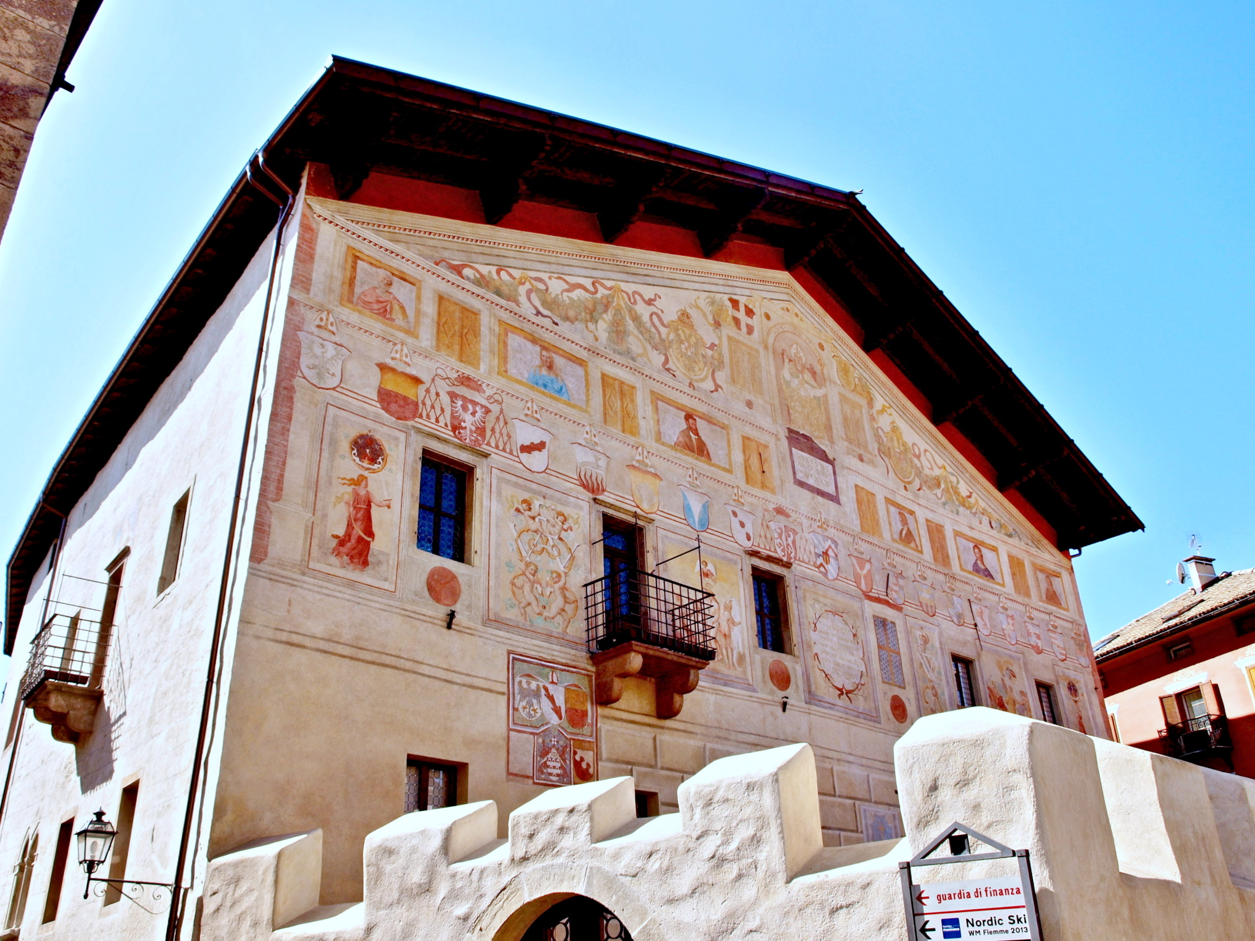 Cavalese